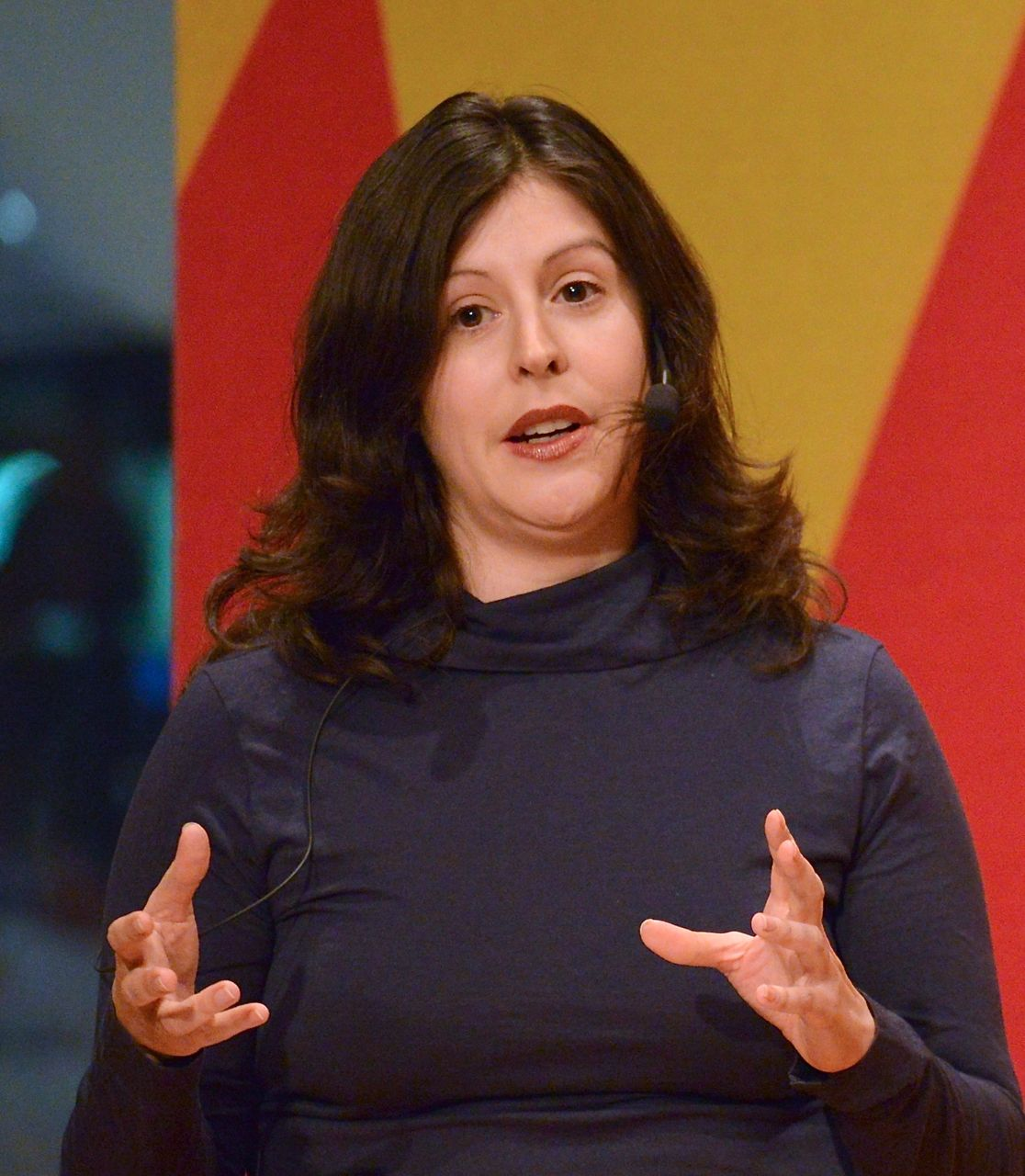 America Vera-Zavala i en kulturpolitisk idédebatt på Forum/Debatt i Studion på Kulturhuset-Stadsteatern i Stockholm den 24 februari 2014.